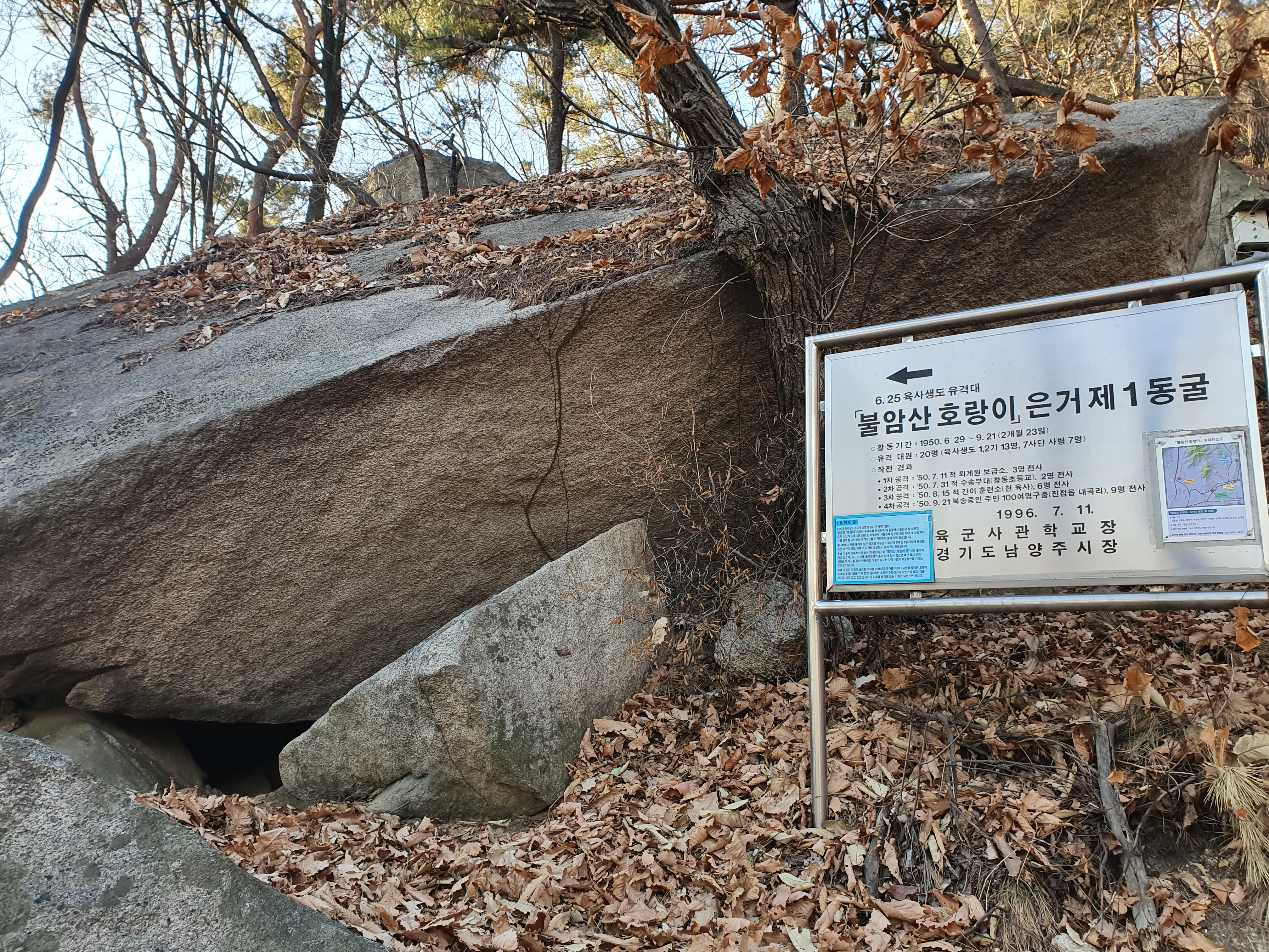 불암산 호랑이 유격대 제 1동굴